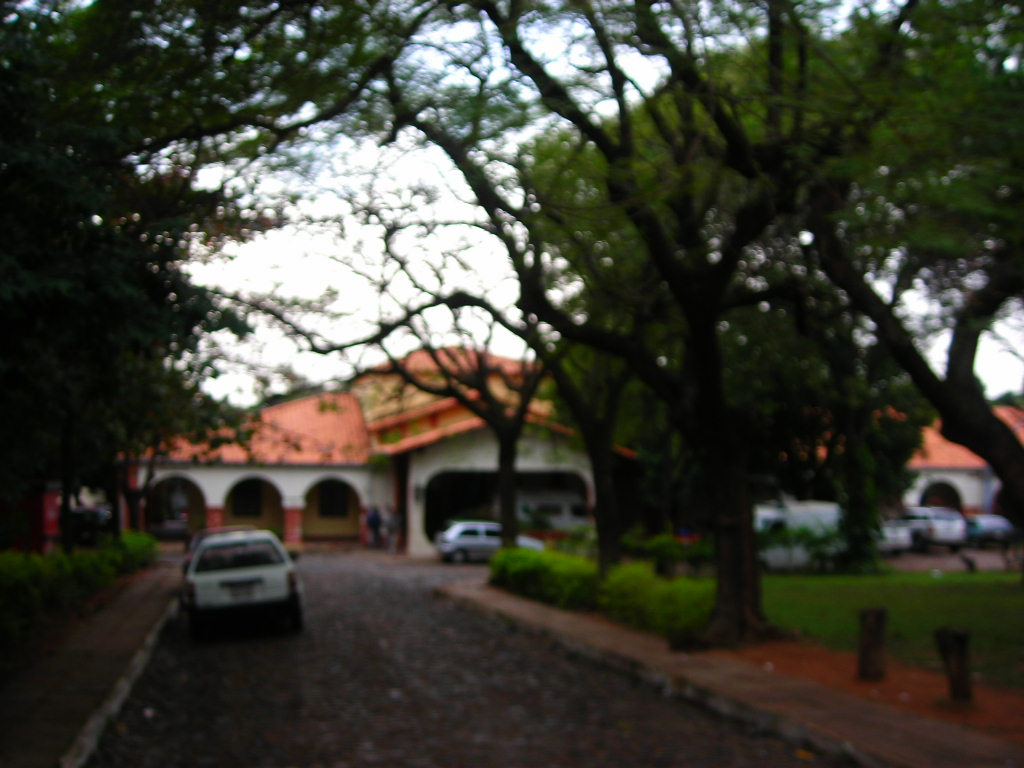 boener